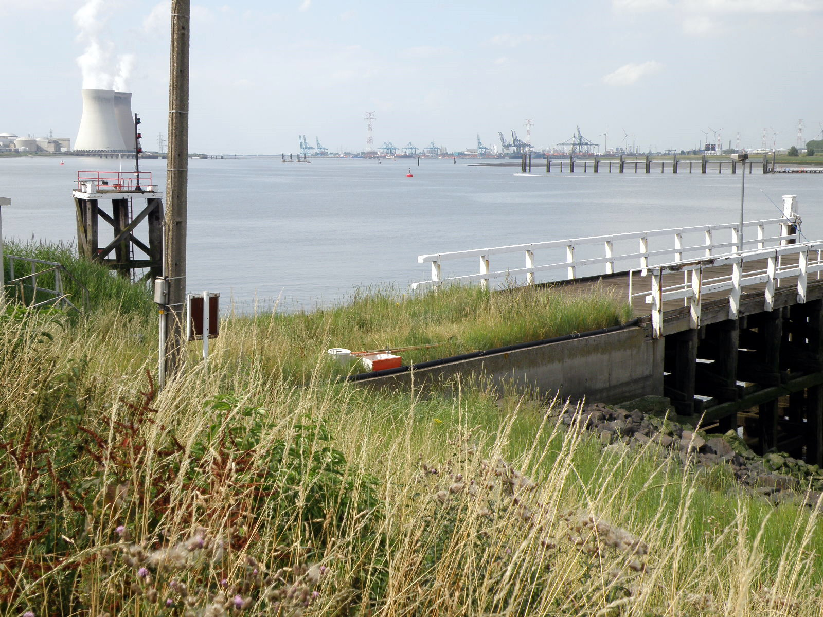 De Schelde ter hoogte van Fort Liefkenshoek, ong. 20 km stroomafwaarts van Antwerpen. Links koeltorens van kerncentrale Doel (linkeroever), midden en rechts hijskranen van Northsea Container Terminal (rechteroever).